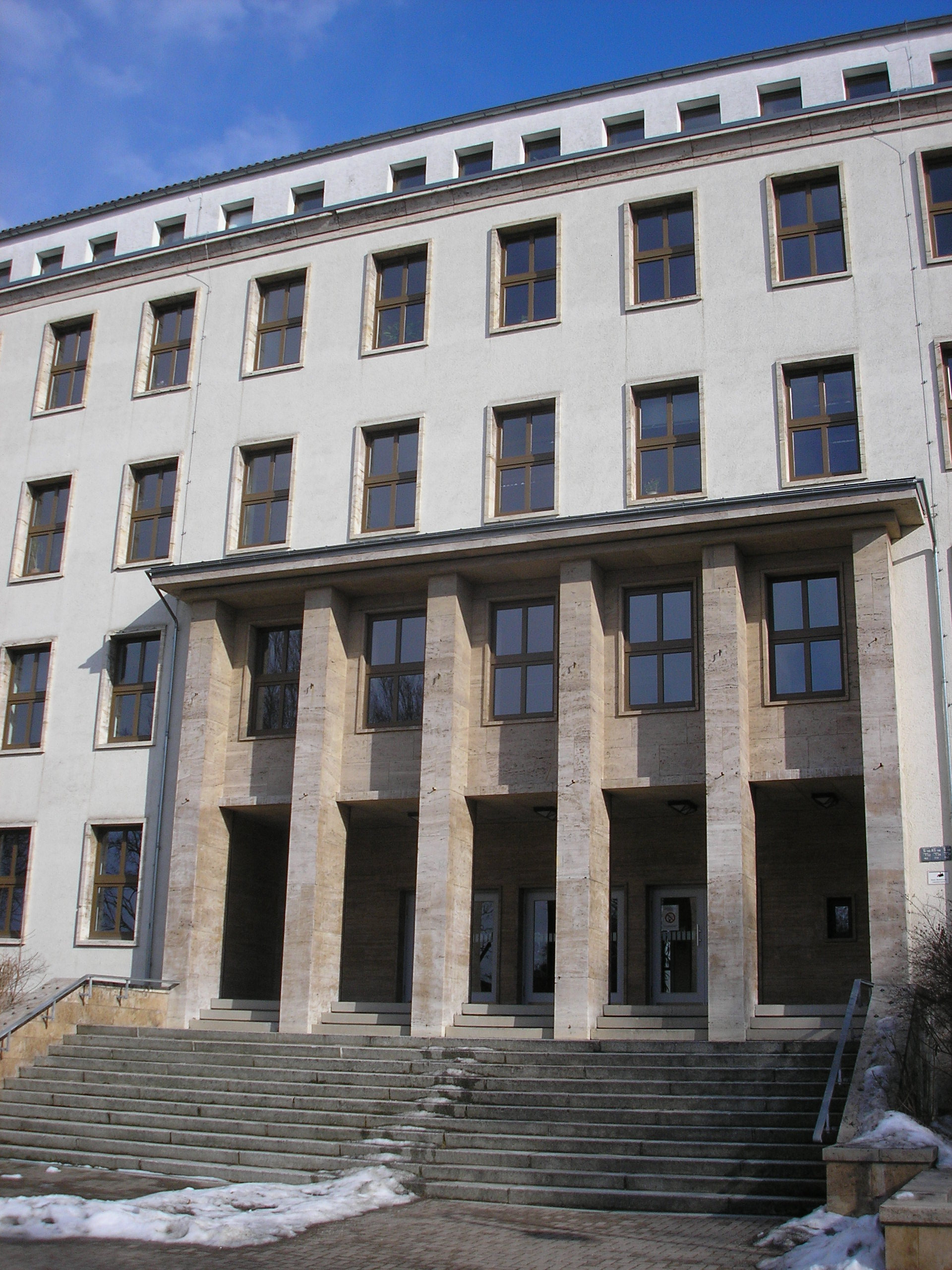 Das Portal des Landwirtschaftsministeriums in Erfurt.